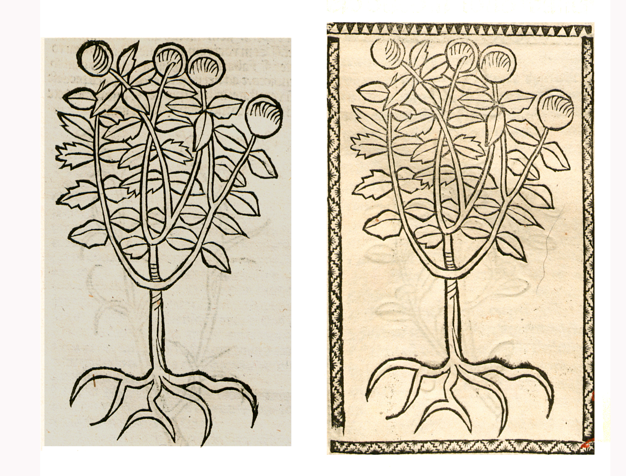 Abbildung von: Buche